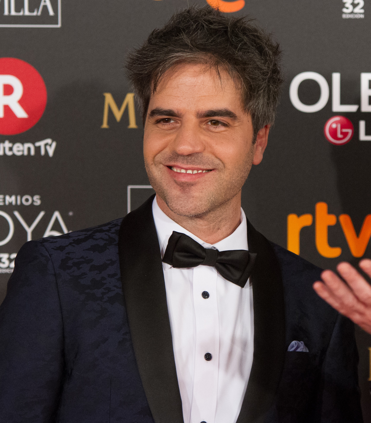 32º Premios Goya, 2018.